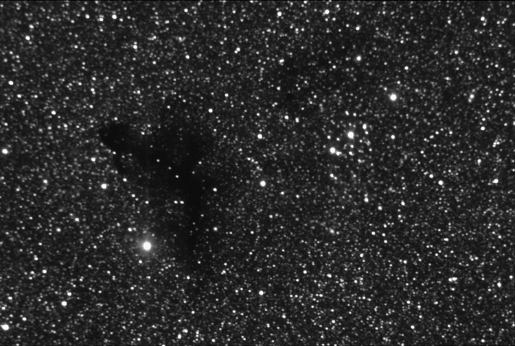 The Ink spot (Barnard 86) dark nebula